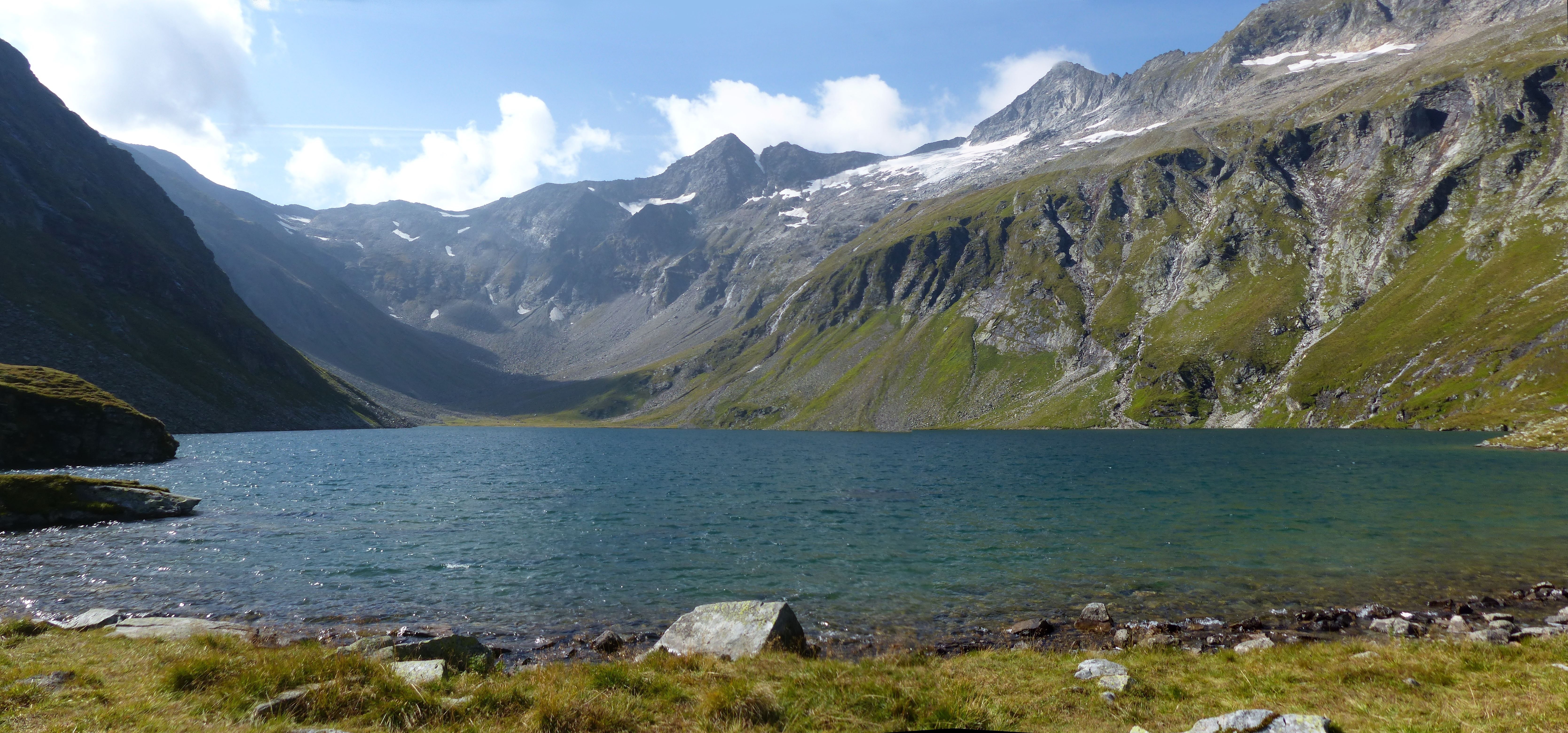 Kratzenbergsee mit Seekopf (Bildmitte) und Kratzenberg (mittig in der rechten Bildhälfte. Bild ist aus zwei Aufnahmen zusammengesetzt.)